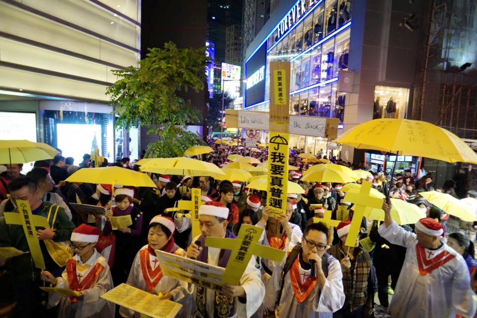 基督路小教會張文衛（牧師）牧師、佔中後援會快必譚得志，與民眾一邊唱改編歌要求普選、批評警察濫用暴力，一邊遊行向時代廣場參加平安夜倒數。